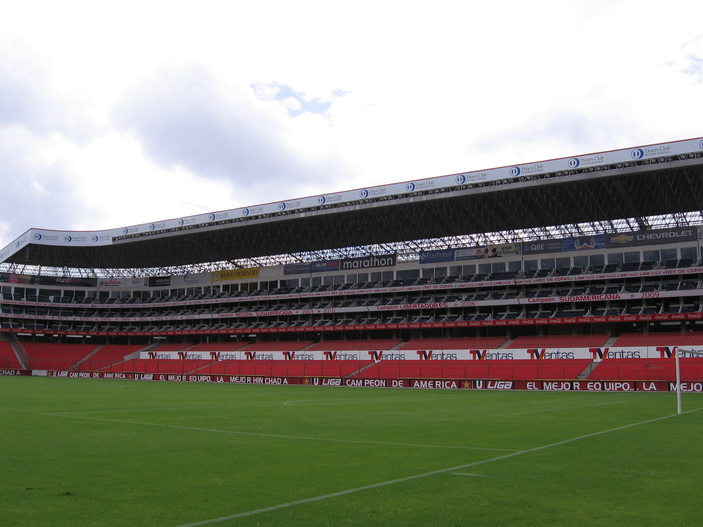 Tribuna Oriental Estadio LDU